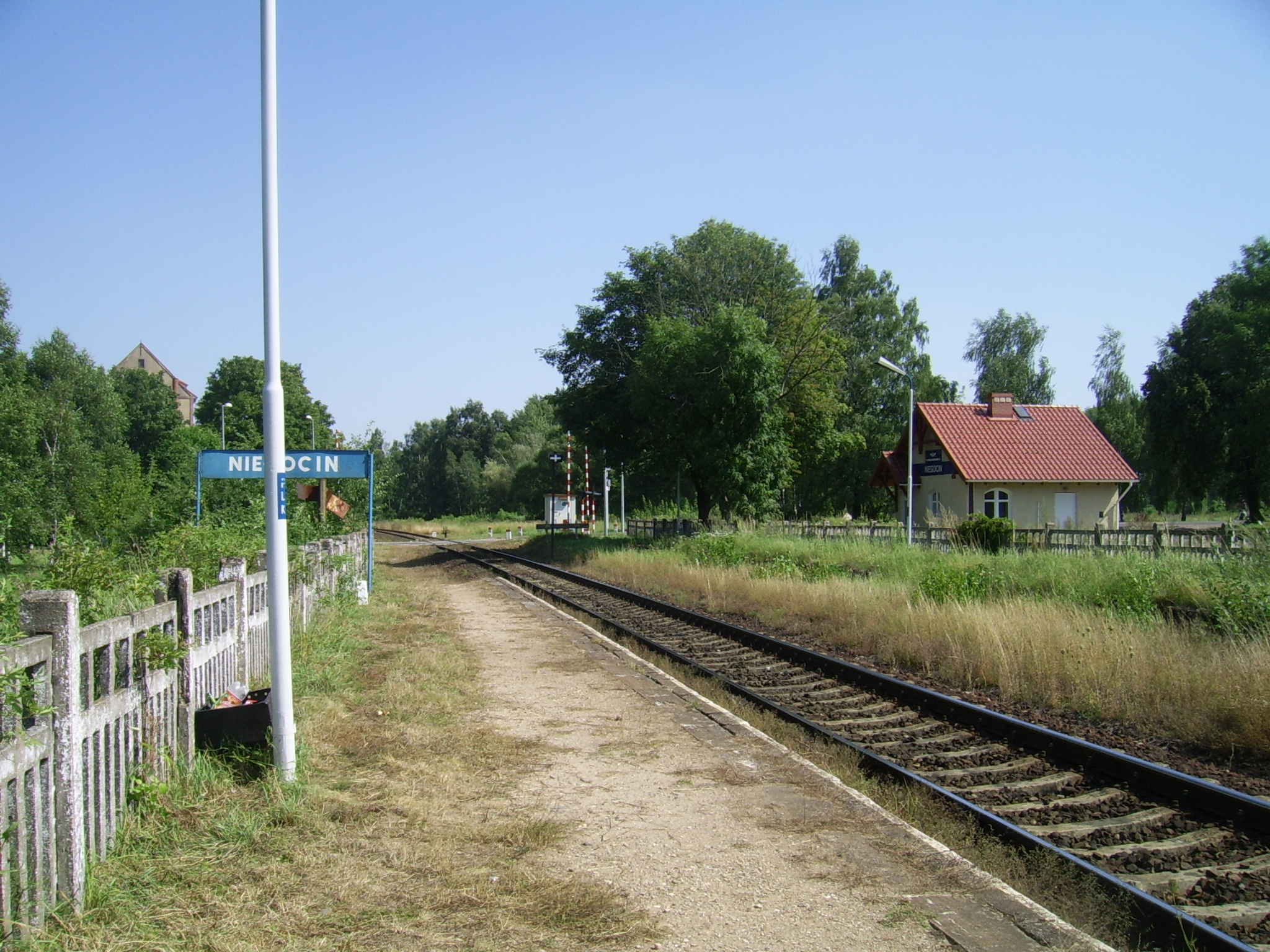 przystanek kolejowy Niegocin w Wilkasach